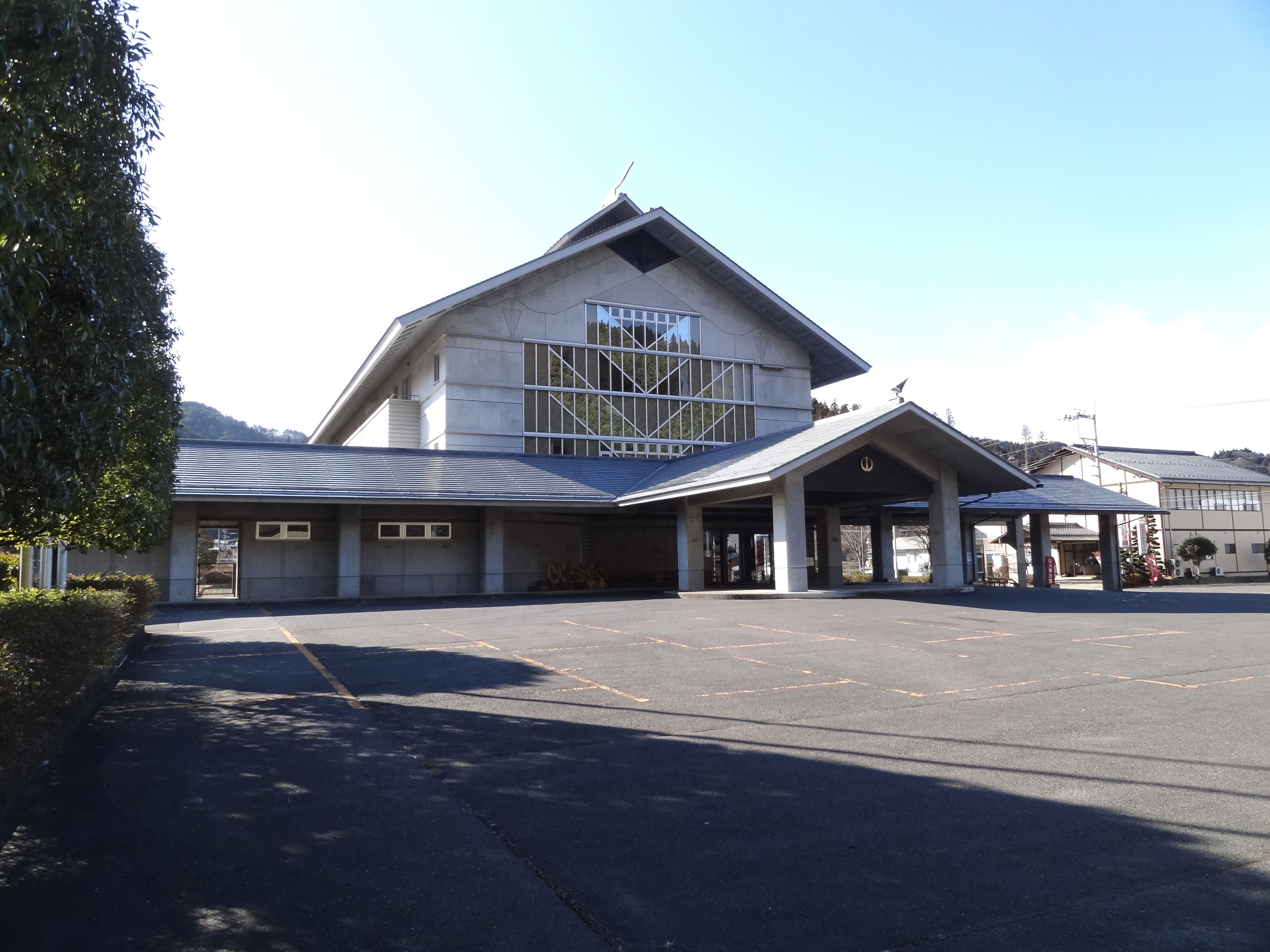 古殿町役場